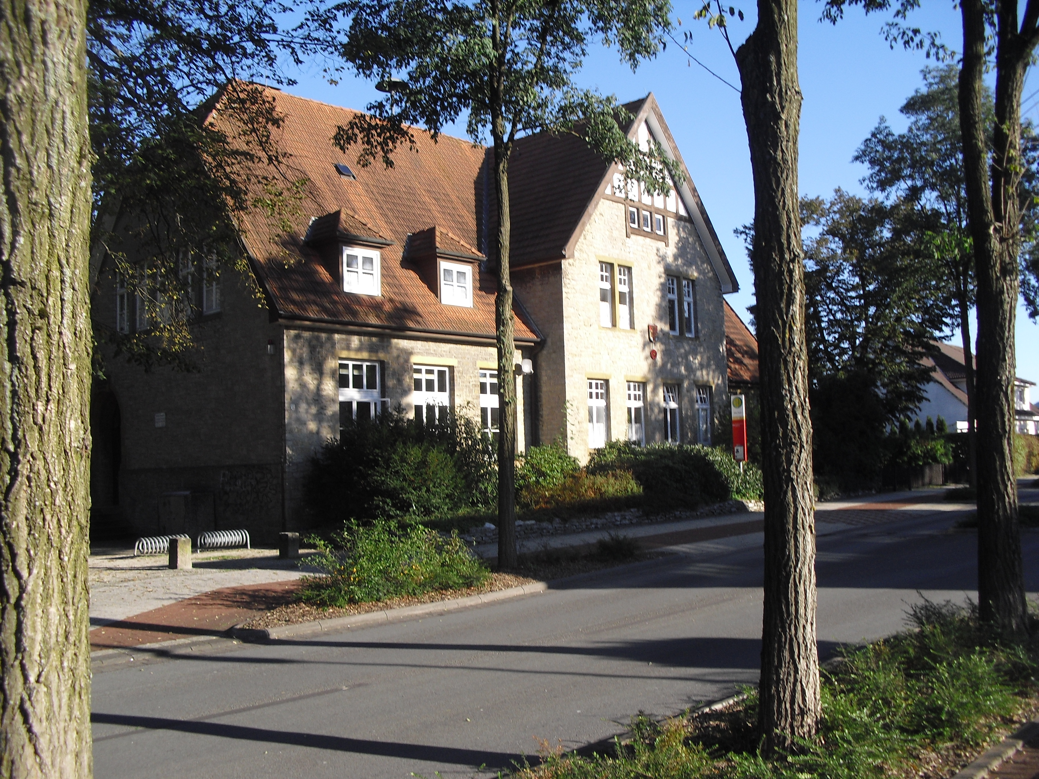 Alte Schule in Augustdorf This is a photograph of an architectural monument. 01